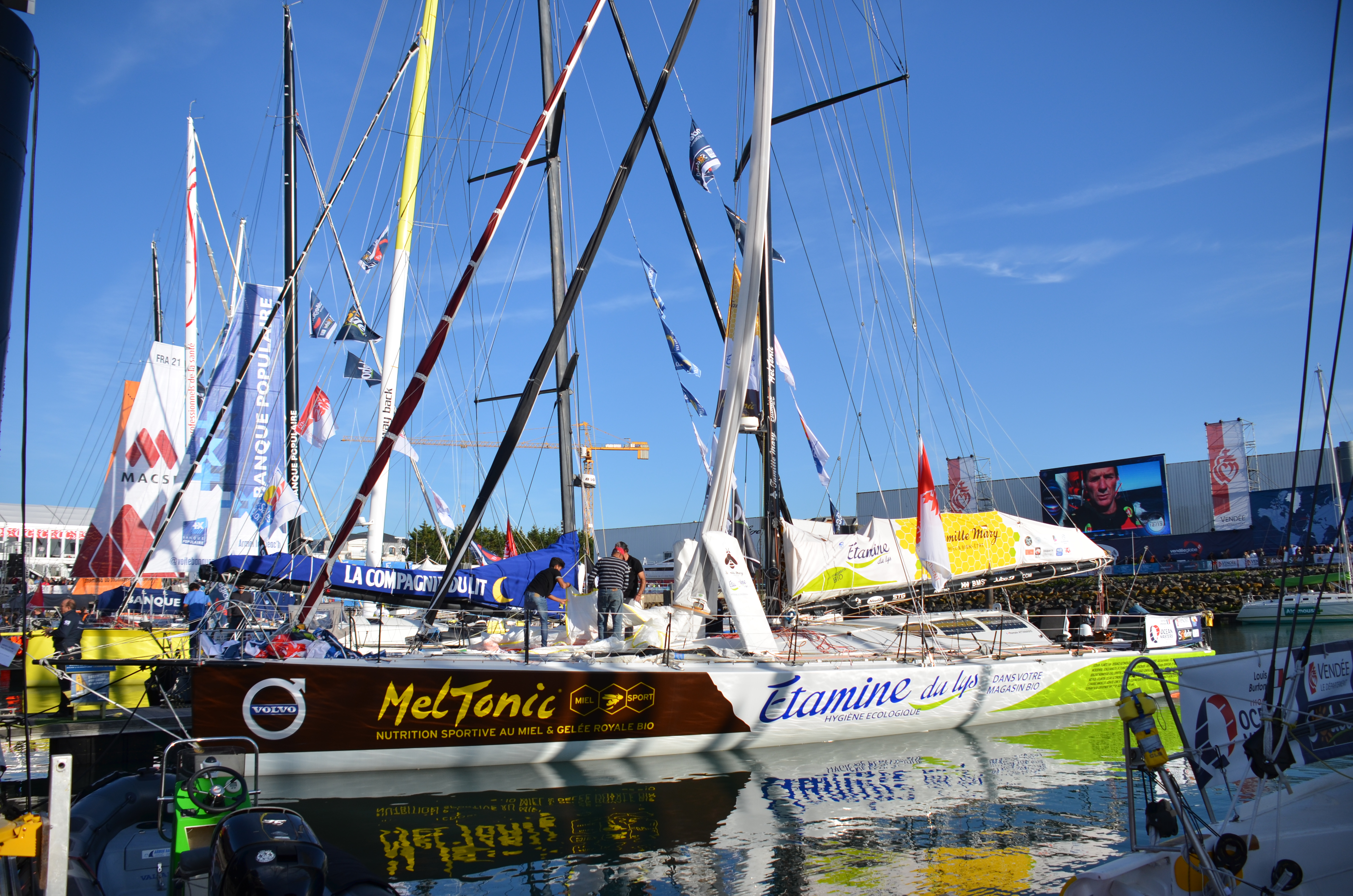 Famille Mary-Etamine Du Lys